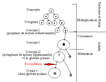 Schéma général de l'ovogénèse